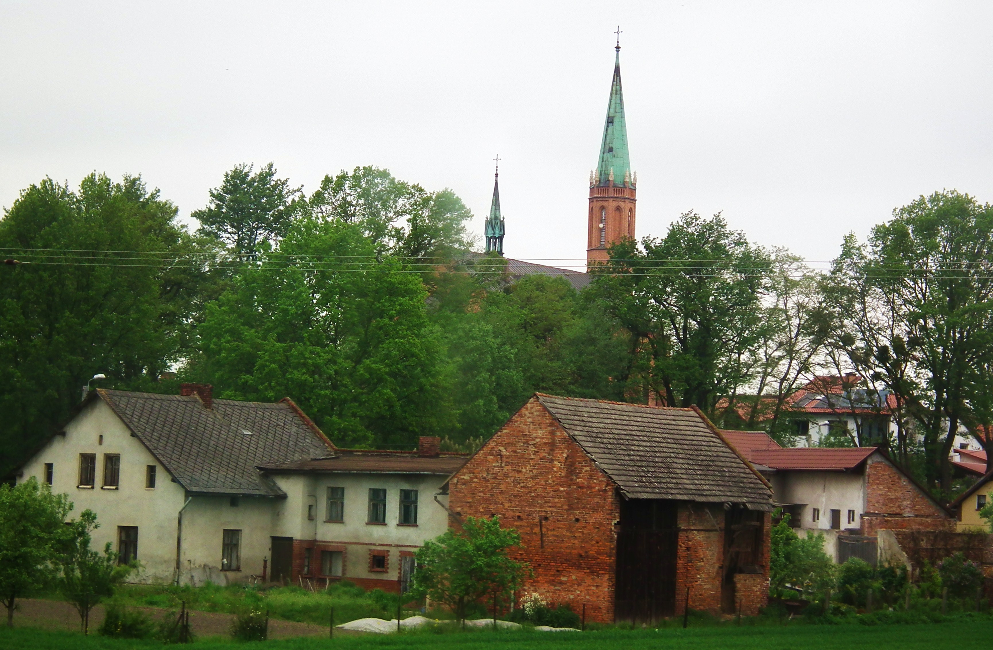 Wieś Cyprzanów pod Raciborzem.